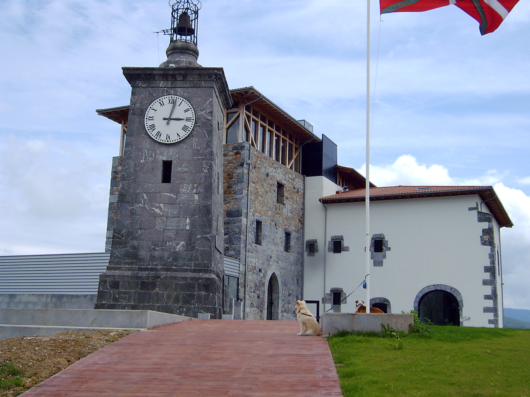 Madariaga dorretxea